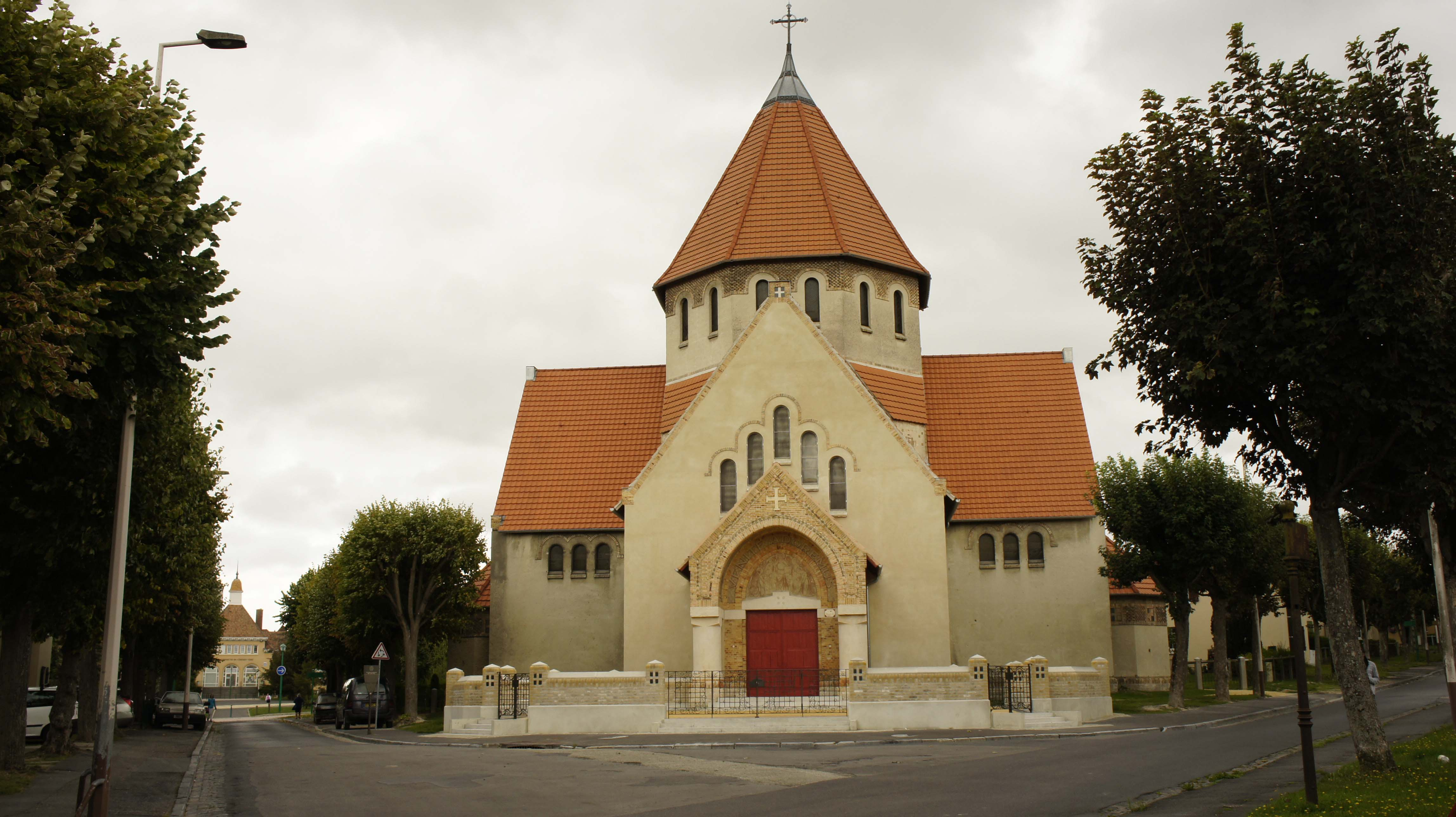 église st-Nicaise du quartier Chemin-vert de Reims vue par l'ouest. Construite en 1923 par J-M Auburtin et Dufay-Delamy architectes, peintures par Berque, Denis et Laurent, maître verrier R.Lalique. Fiche PA00078784 sur la base Mérimée et monument classé en 2002. .